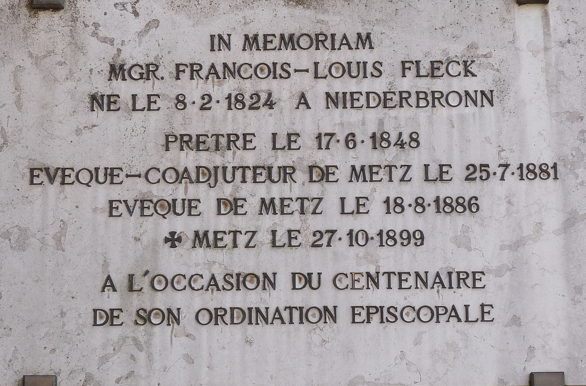 Plaque dédiée à François-Louis Fleck, né à Niederbronn, ancien évêque de Metz. Eglise Saint-Martin, Niederbronn-les-Bains (Bas-Rhin).